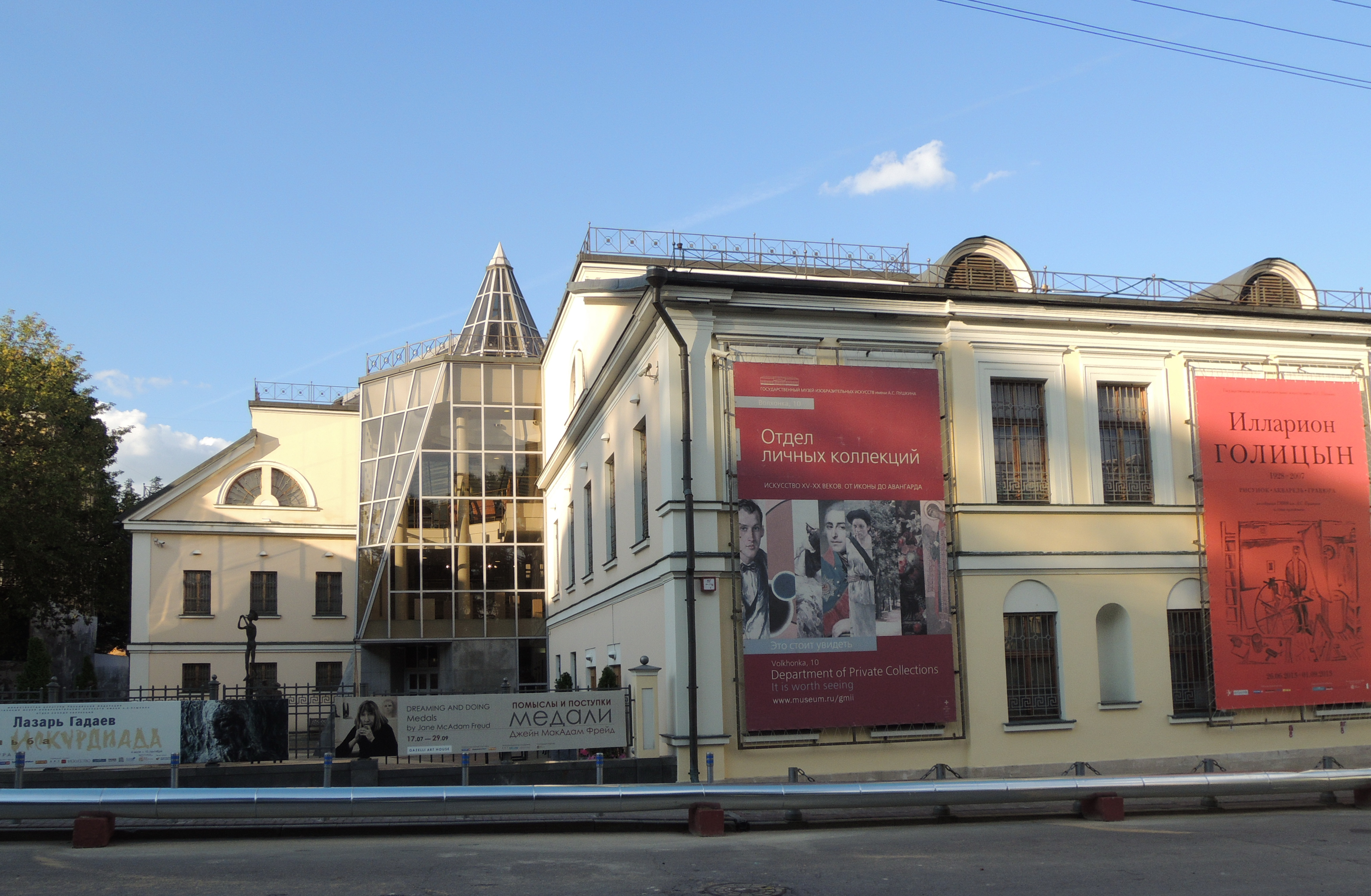 Музейный городок ГМИИ.